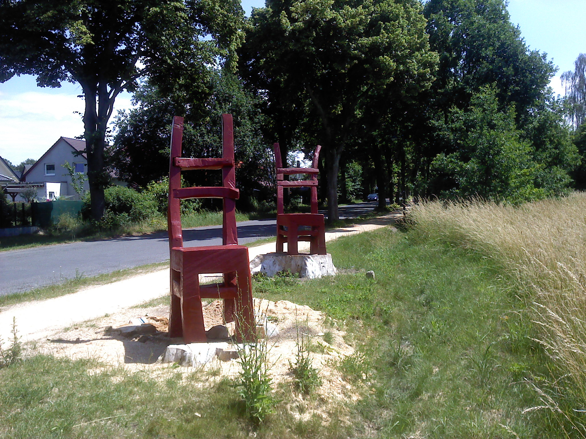 Kunst im OT Wandlitz der Gemeinde Wandlitz